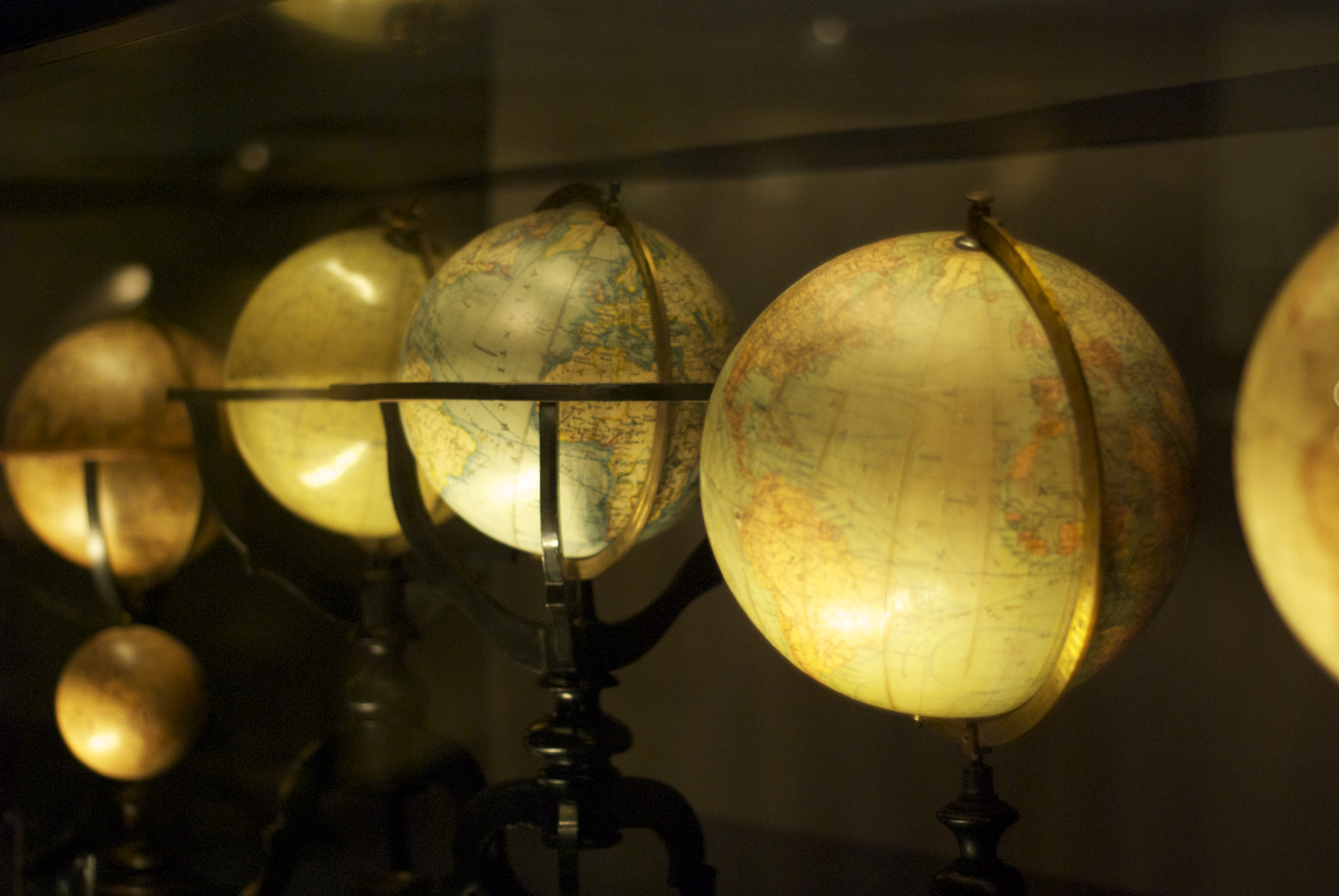 Nationalbibliothek, Prunksaaltrakt und Josefsplatz